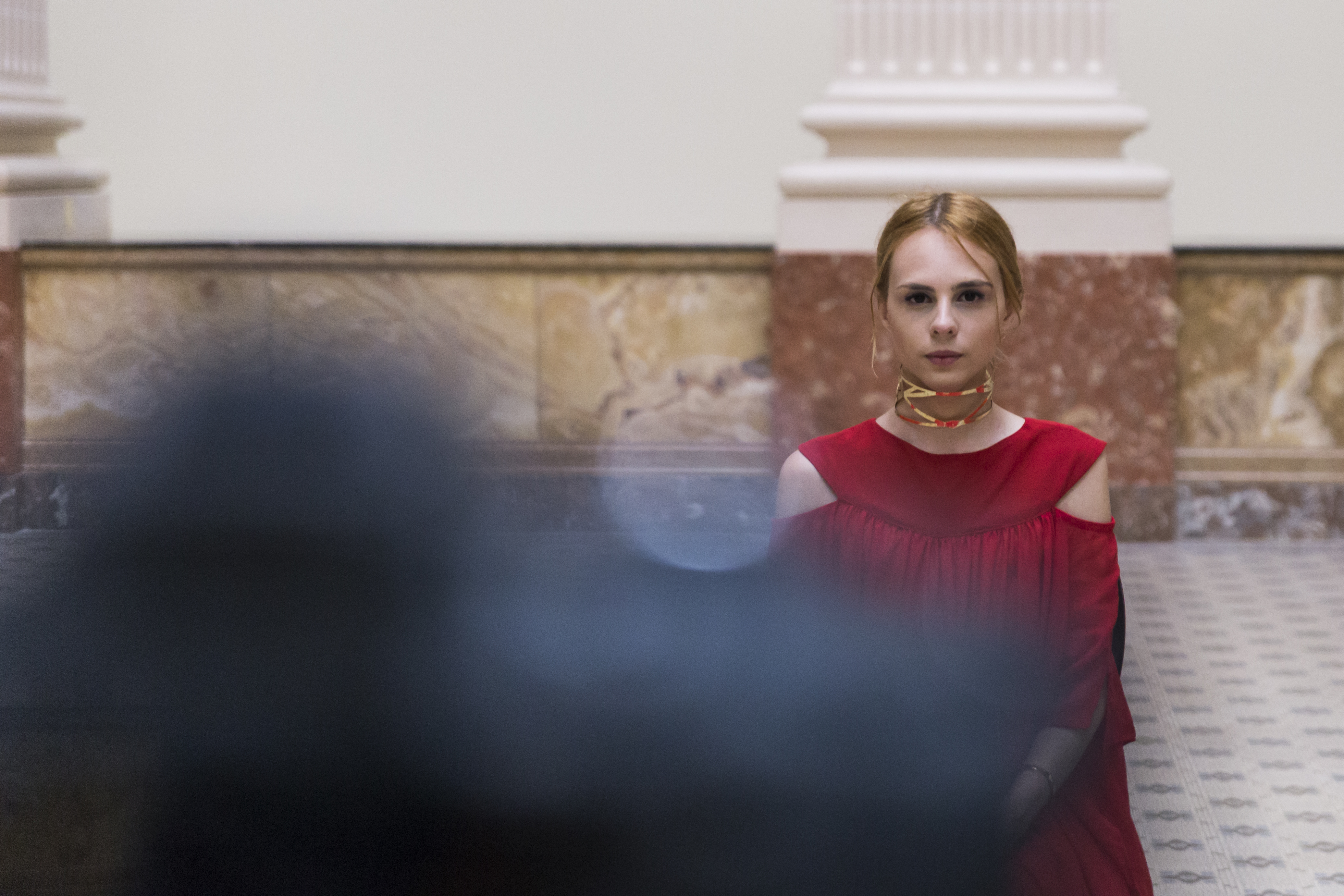 Fotografia da artista Élle de Bernardini, durante performance no Santander Cultural, em Porto Alegre, Brasil.